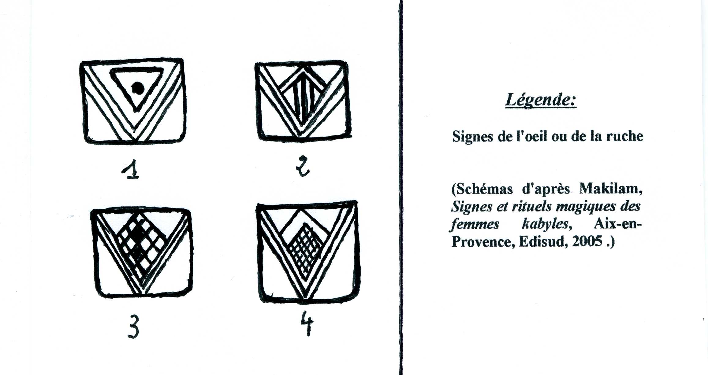 Signes de poteries peintes en Kabylie (Algérie)